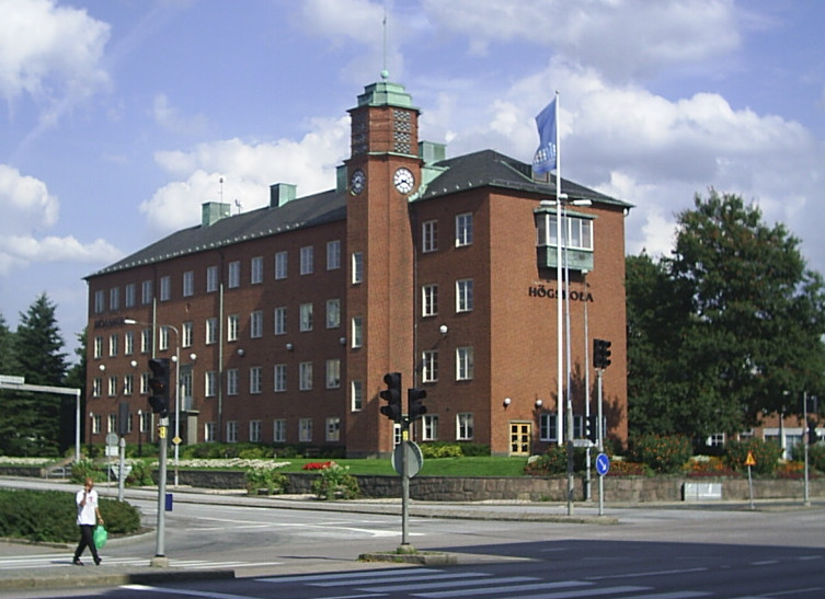 Före detta Polhemsgymnasiet, Trollhättan. Lokalerna användes fram till 2007 av Högskolan Väst. Fotograf Tubaist. Byggnaden ursprungligen rest 1936 för Trollhättans samrealskola .